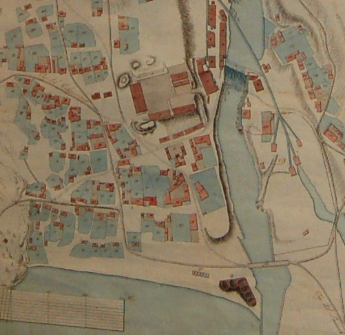 Batteriet på Langestrand i "gamle dager". Batteritomta er oppkalt etter dette. Bilde i Fritzøe Museum i Larvik.